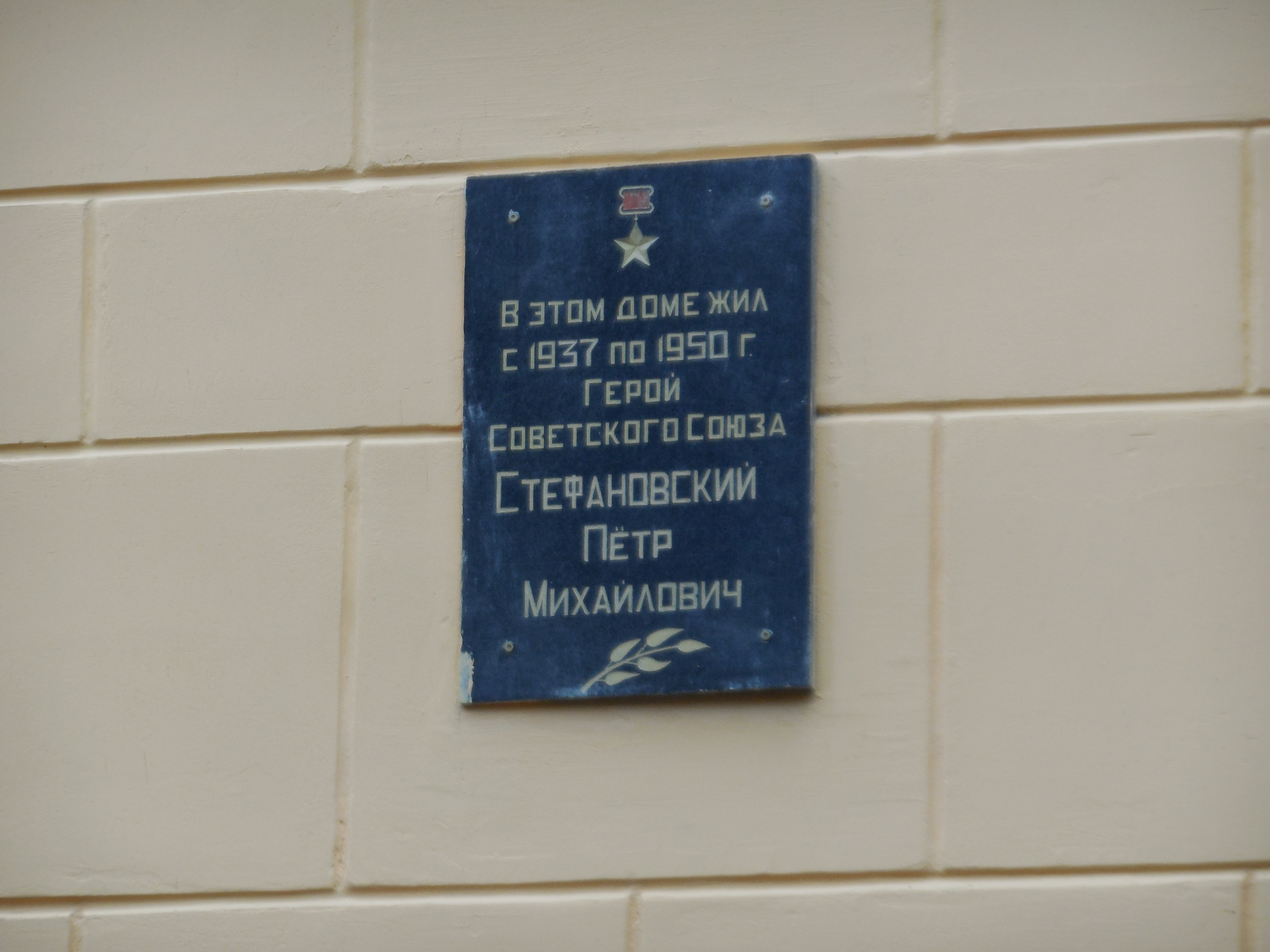 Стефановский, Пётр Михайлович